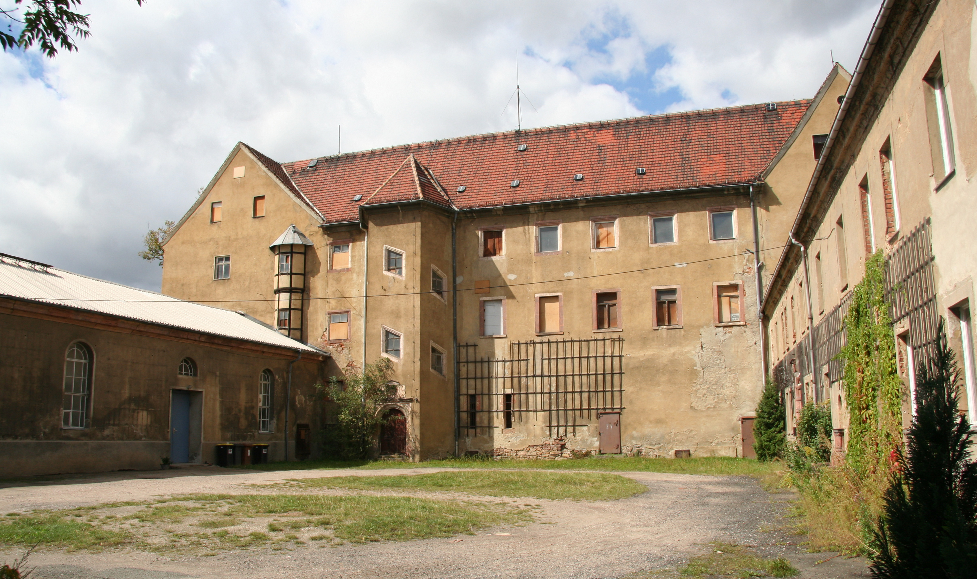 Alten Schloss in Penig